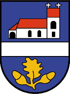 Altach, Vorarlberg: Ein blauer, in der Mitte von einem silbernen Fluss quer durchzogener Schild. Oberhalb des Flusses erscheint abgeledigt eine weißgetünchte zweifenstrige Kirche, an die rechts ein Eingangsvorbau und links ein niedriger Turm mit Satteldach und zwei Kreuzen auf der Giebellinie angebaut sind. Der Turm weist übereinander zwei Fenster auf, von denen das untere das Ausmaß einer Luke hat. Turm, Kirchenschiff und Eingangsvorbau sind rot gedeckt. Unterhalb des Flusses ist ein natürlicher Eichenzweig mit einem Blatte zwischen zwei Eicheln zu sehen. Den Schild umgibt eine ornamentierte bronzefarbene Randeinfassung. (Verleihung: 20. Februar 1929)